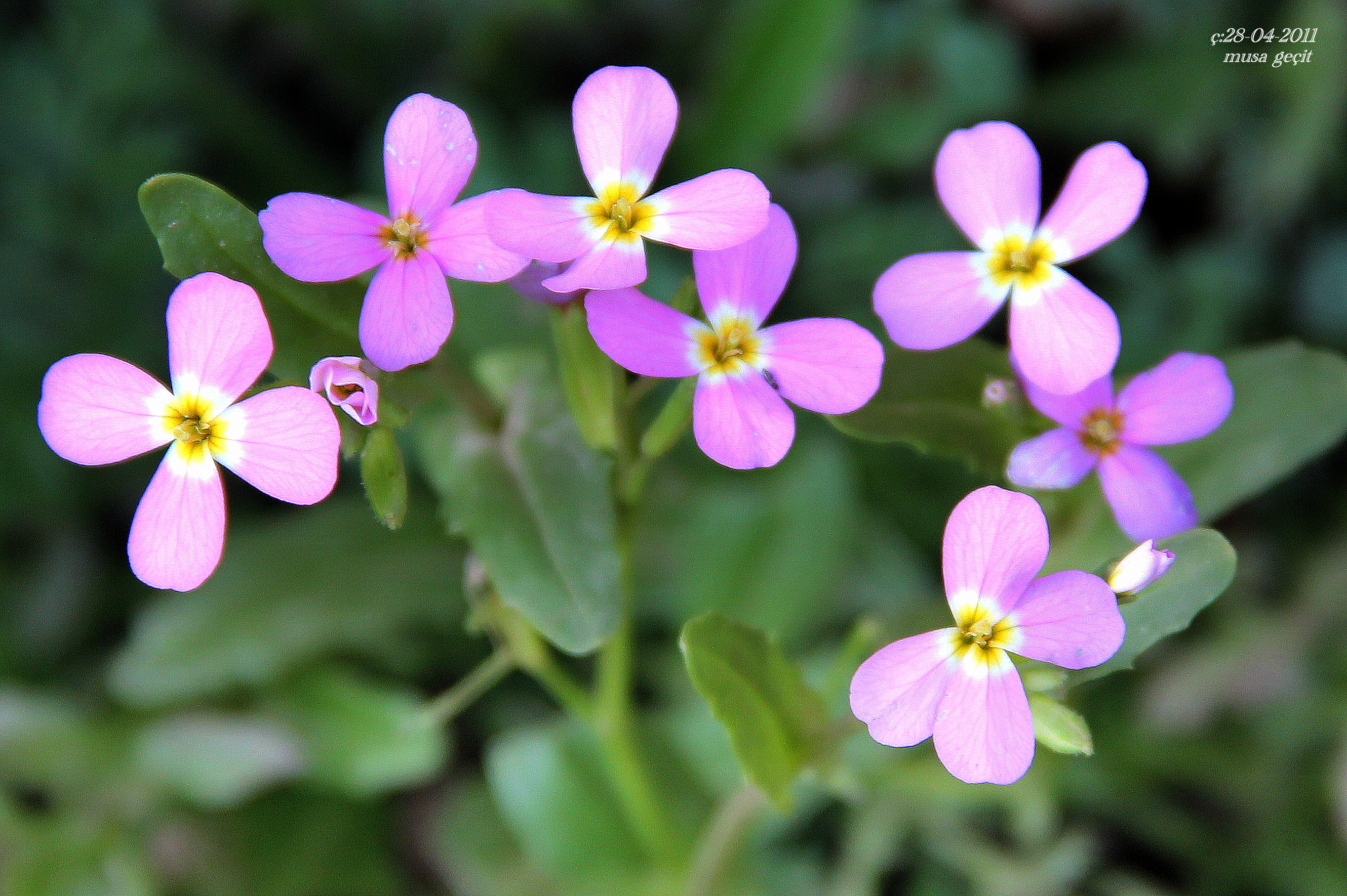 Yer:Mardin Malcolmia crenulata